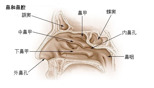 鼻和鼻腔图